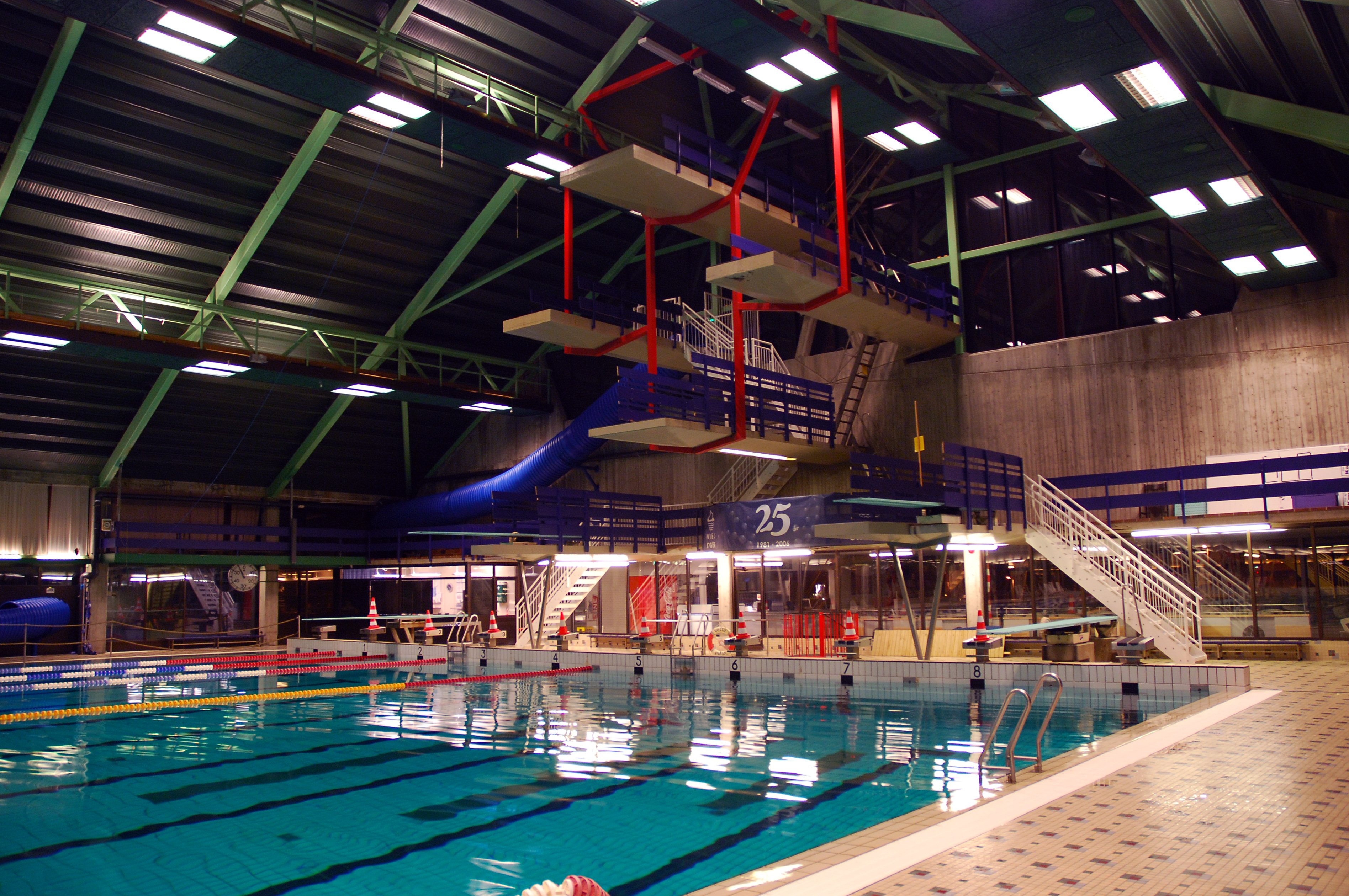 Ankerskogen svømmehall, in Hamar, Hedmark, Norway.